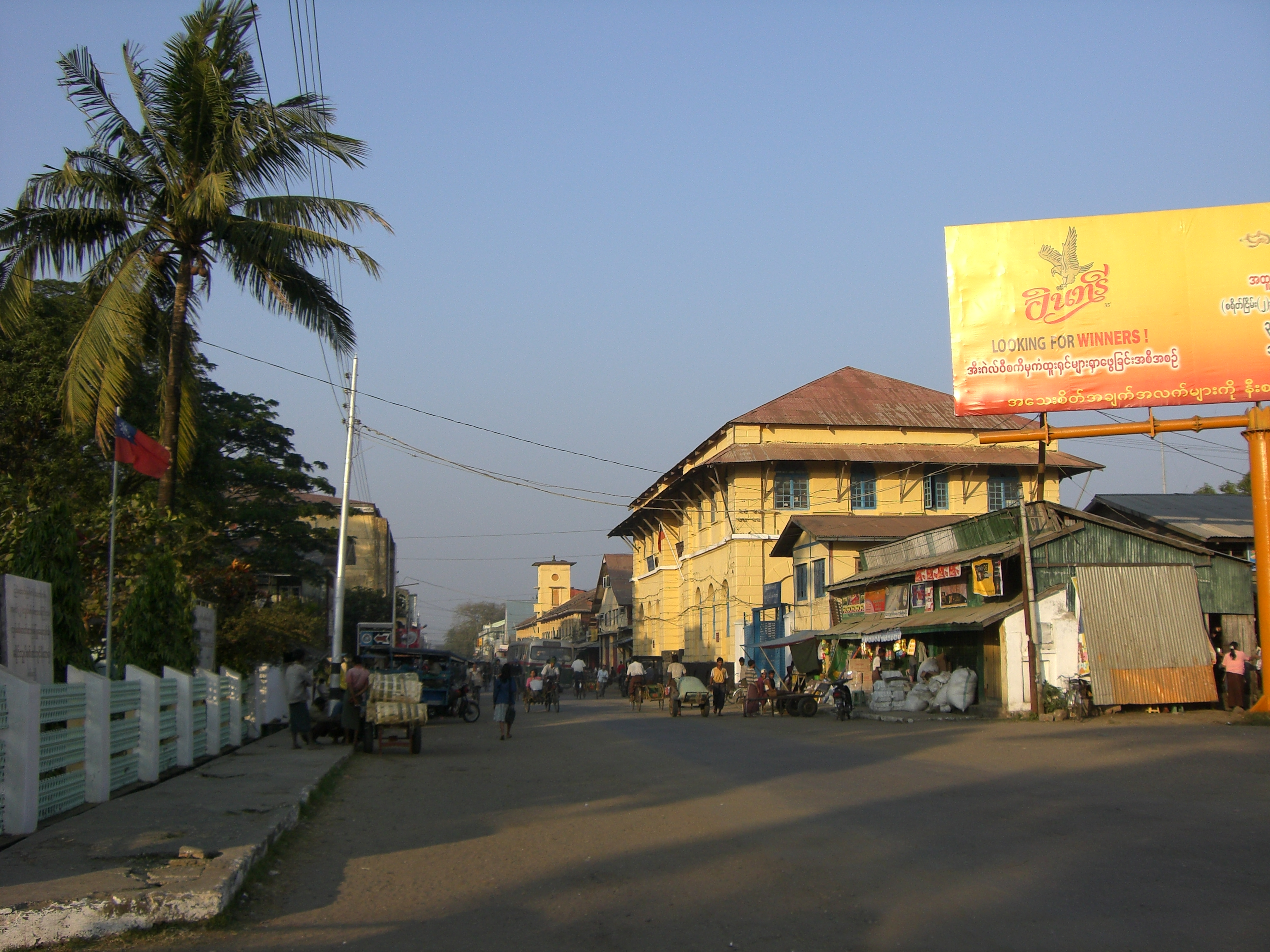 main street in Sittwe, Burma